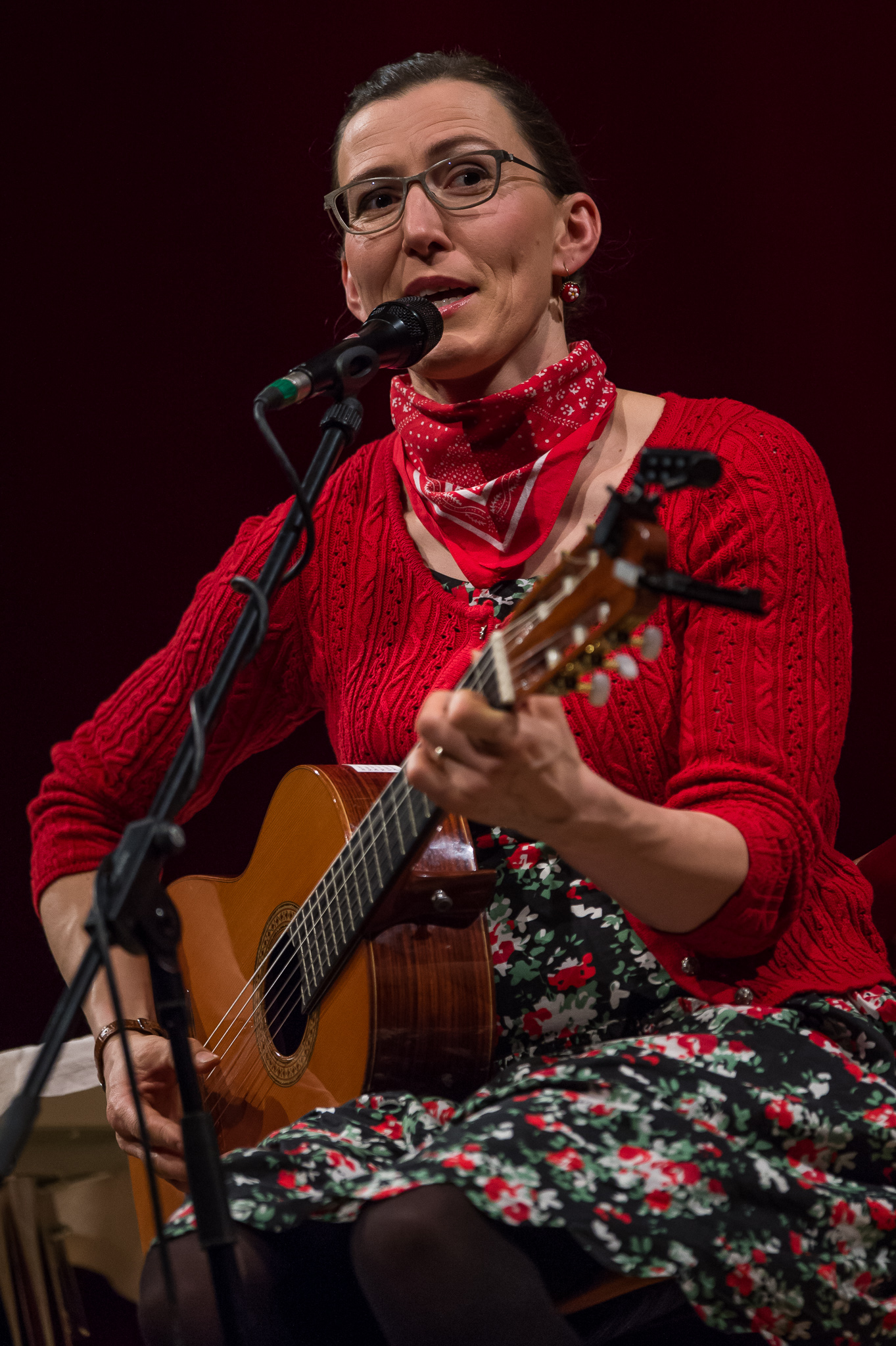 Comedy,Concertbüro Franken,Konzert,Livekonzert,Livemusik,Martina Schwarzmann,Meistersingerhalle,Musik